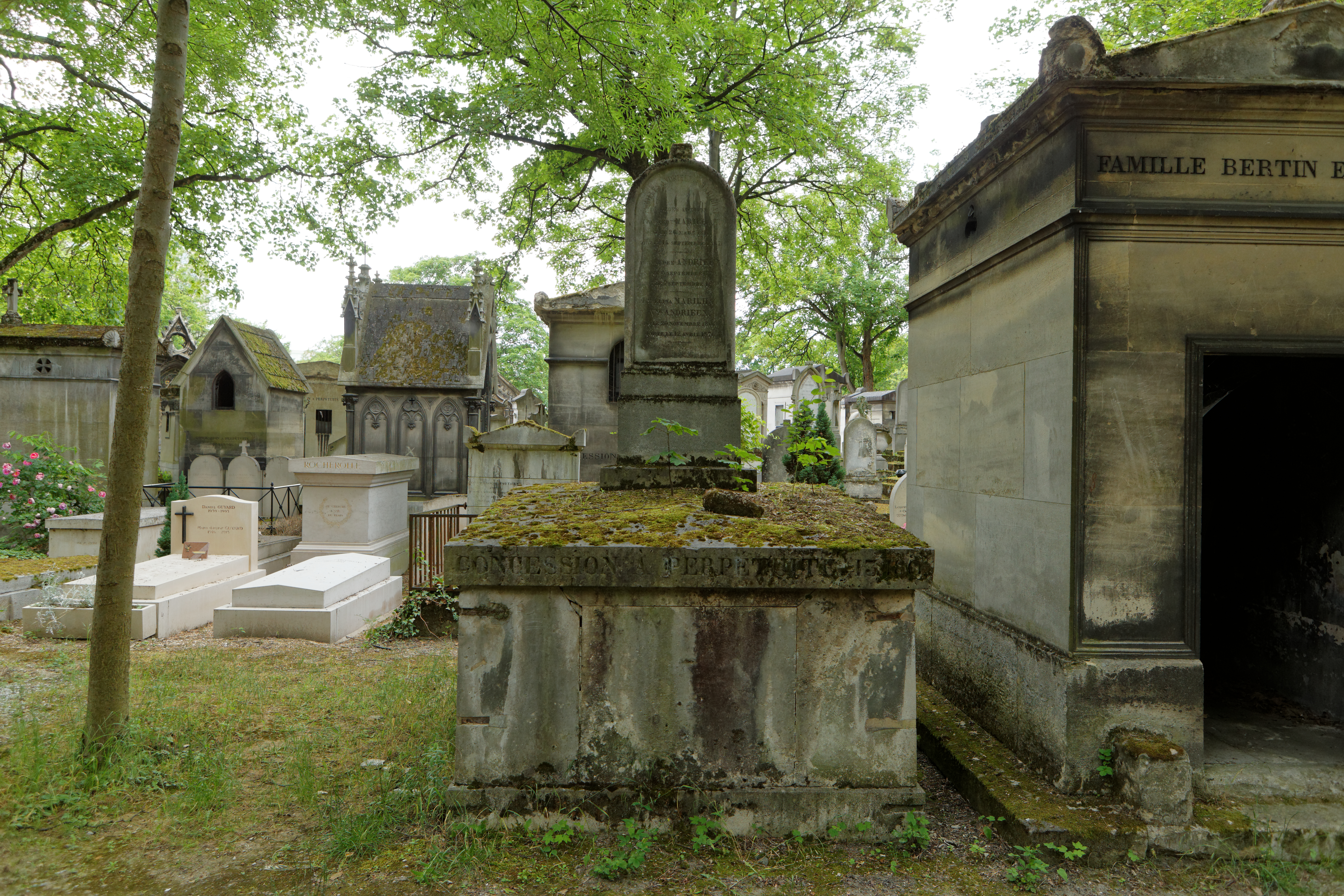 Sépulture de Prosper Marilhat (1811-1847), peintre orientaliste et naturaliste.